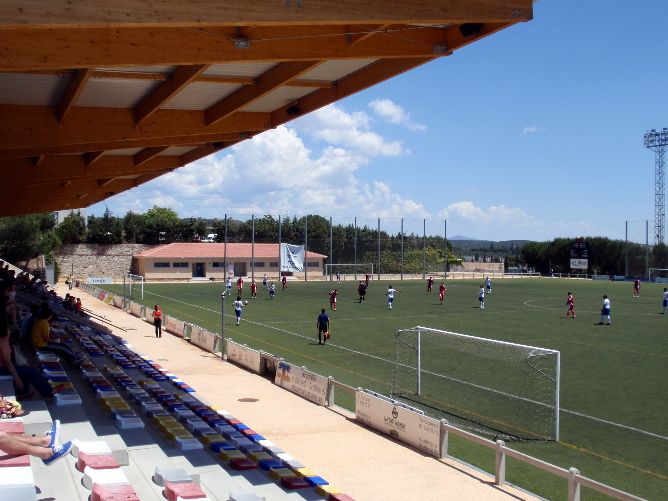 Torrelodones. Campo de fútbol.